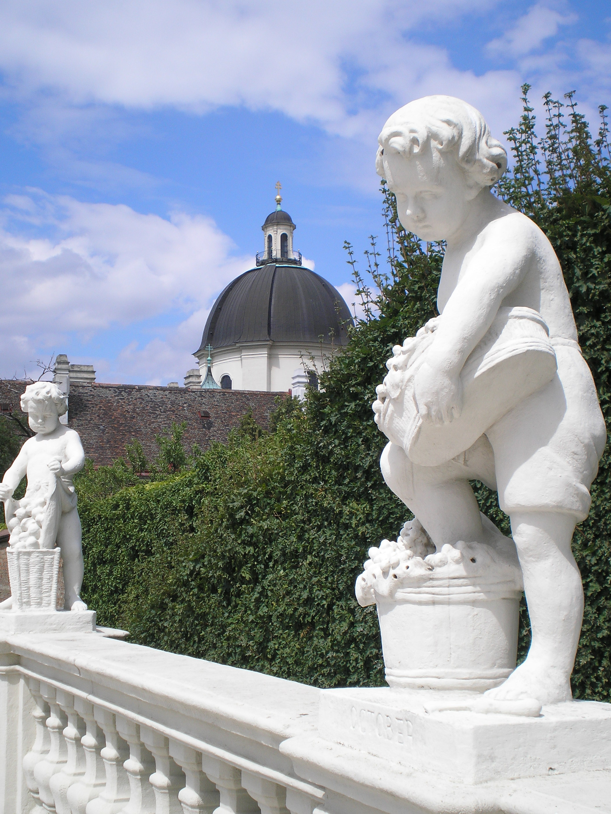 Sculpture